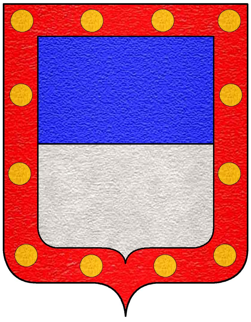 Stemma della famiglia Scappi